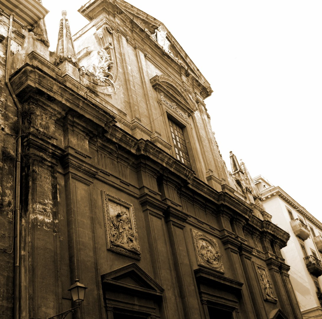 Palermo